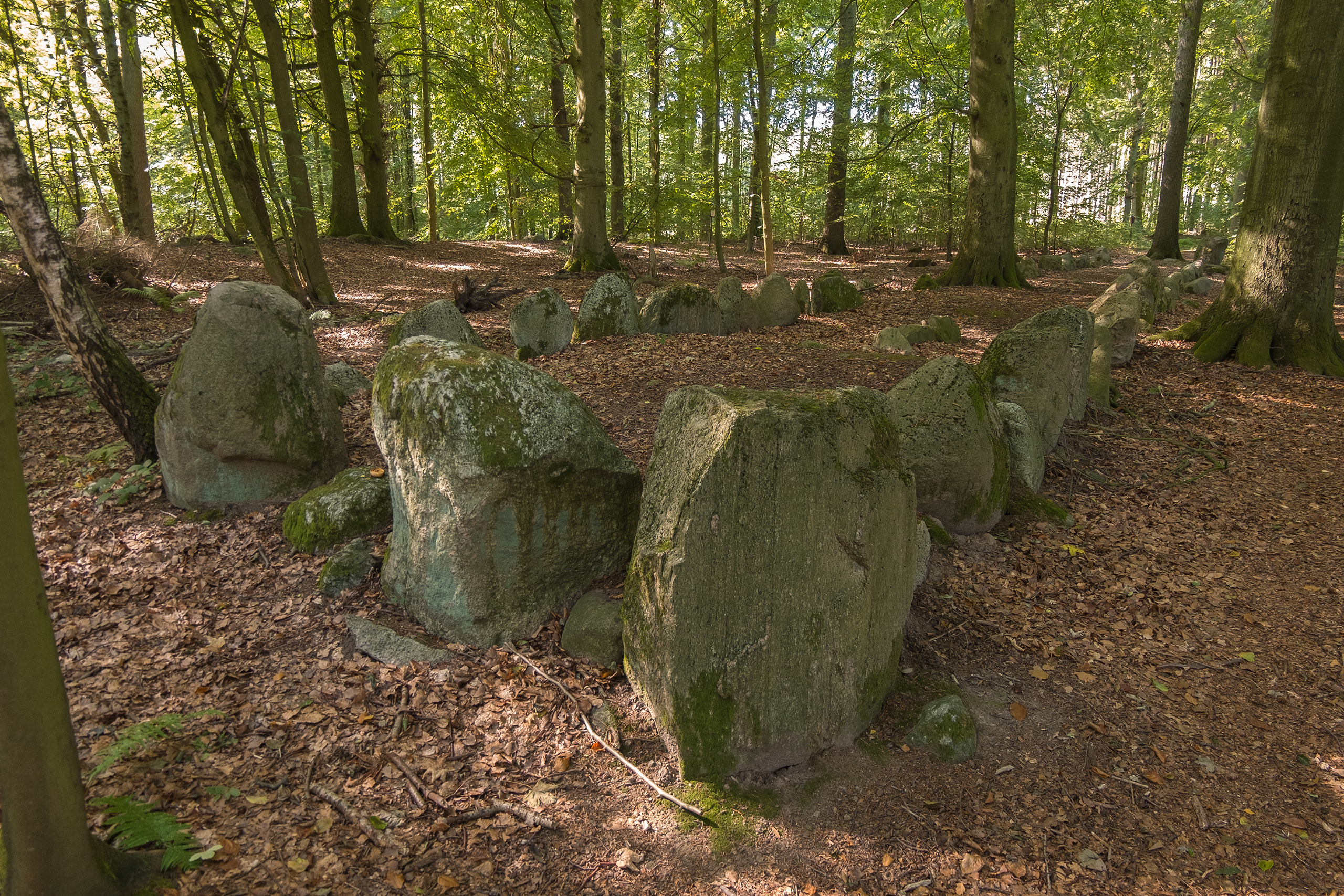 Großsteingrab der jungsteinzeitlichen Trichterbecherkultur in Mecklenburg-Vorpommern